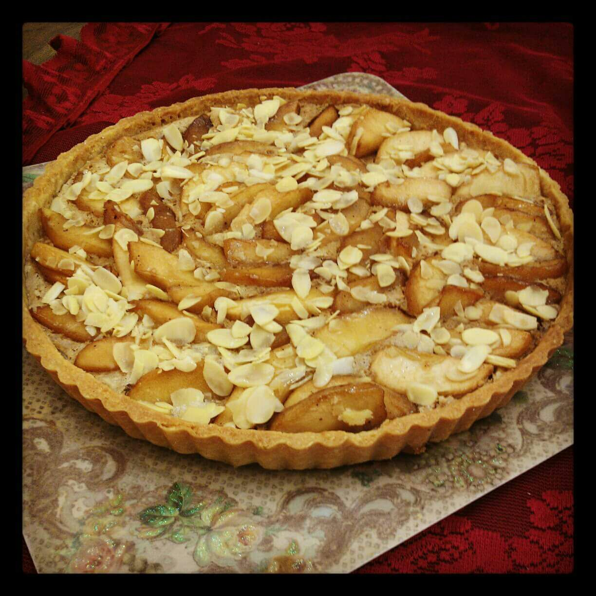 עוגת פאי תפוחים